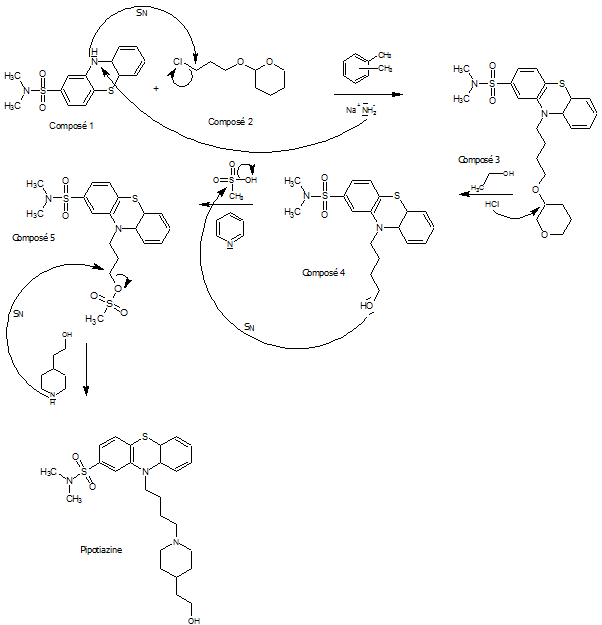 image de la synthèse